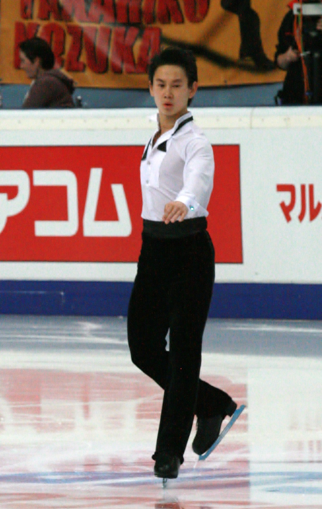 Денис Тен (Казахстан) на Кубке Ростелекома 2012. Произвольная программа.